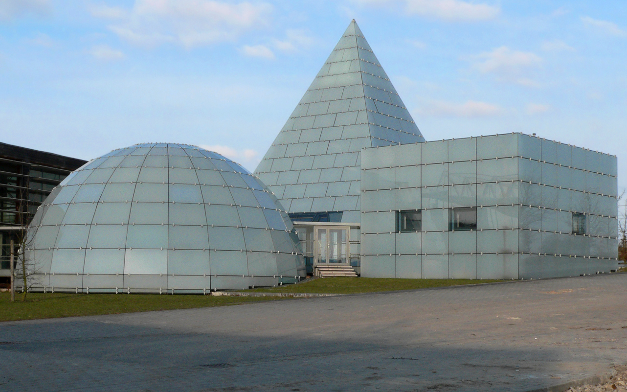 Expo Pavillon Dänemark